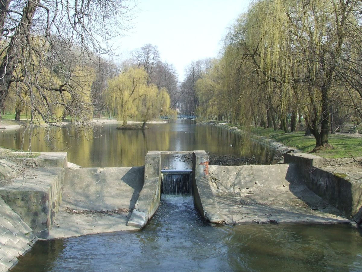 Mińsk Mazowiecki, spiętrzenie w parku na rzece Srebrnej